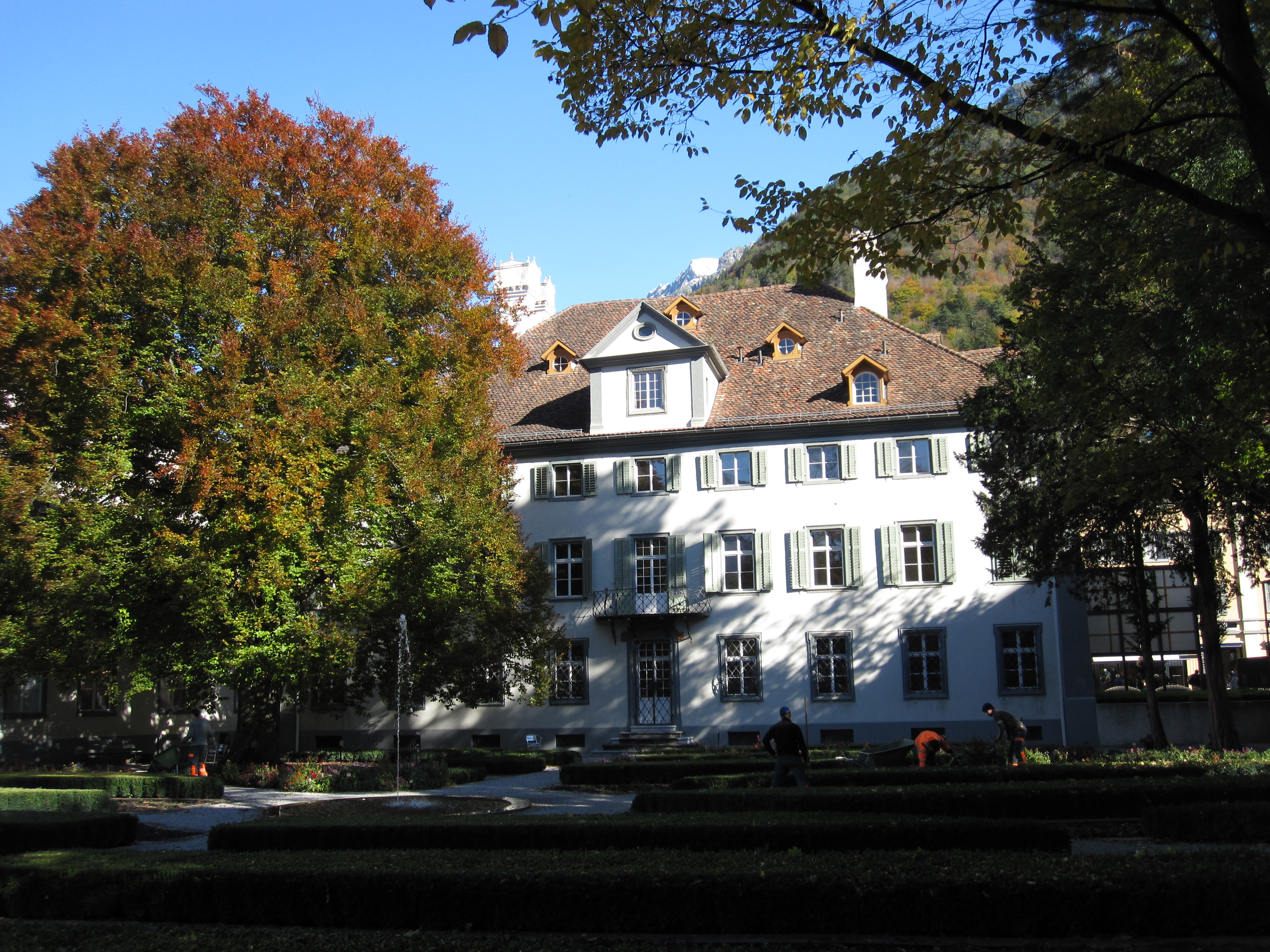 Altes Gebäu in Chur (Kanton Graubünden, Schweiz)